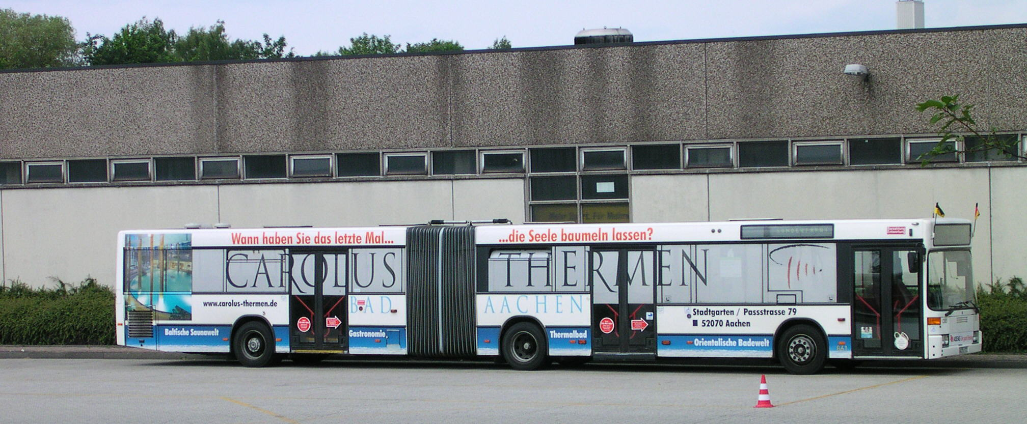 Gelenkbus auf dem ASEAG Gelände mit Werbung für die Aachener Thermen